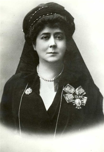 Капитолина Николаевна Макарова (1850-1946), жена вице-адмирала